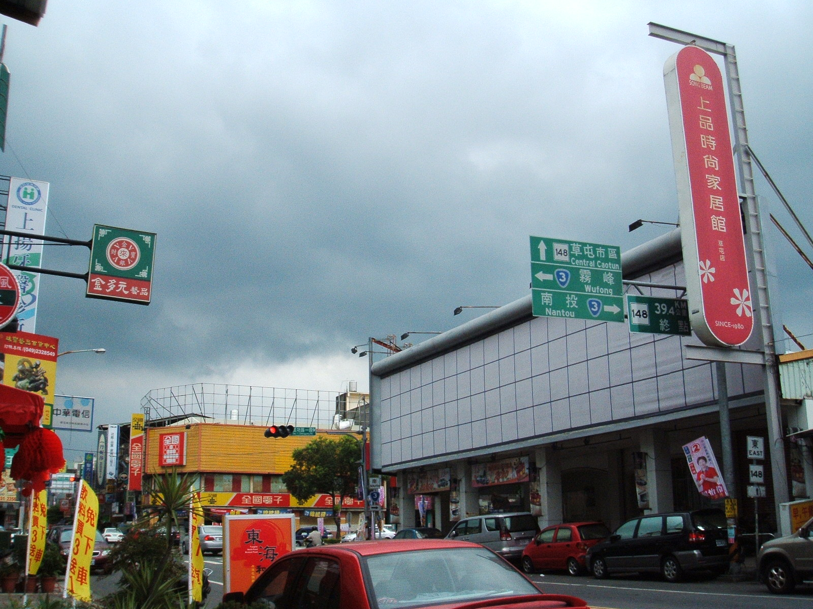 南投縣草屯鎮縣道148號新終點。